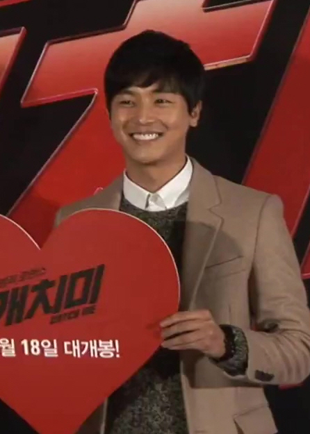 (캐치미) VIP 시사회 현장 공개